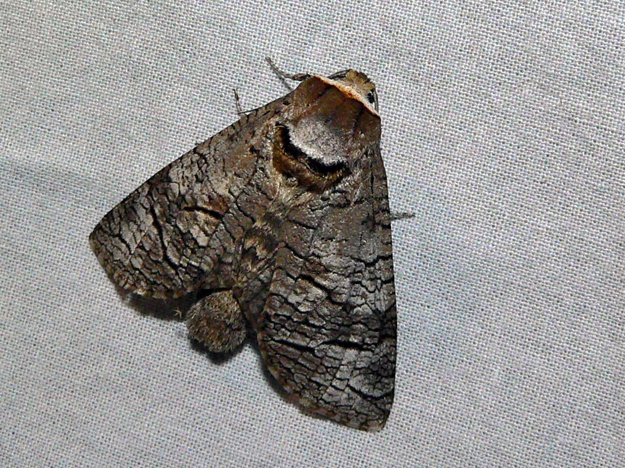 Carlencas, Hérault, FRANCE